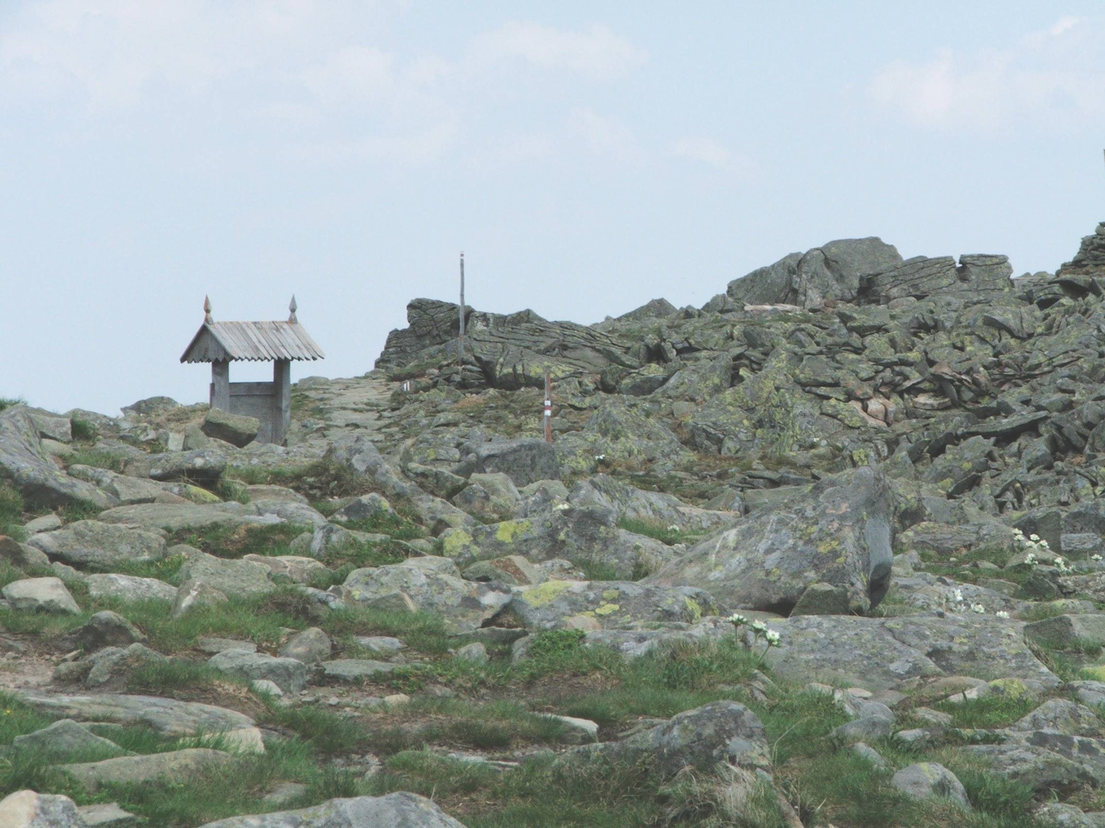 Babia Góra. Partie podszczytowe. Rumowisko Babiej Góry